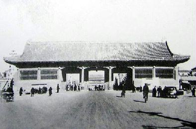 北京皇城地安门